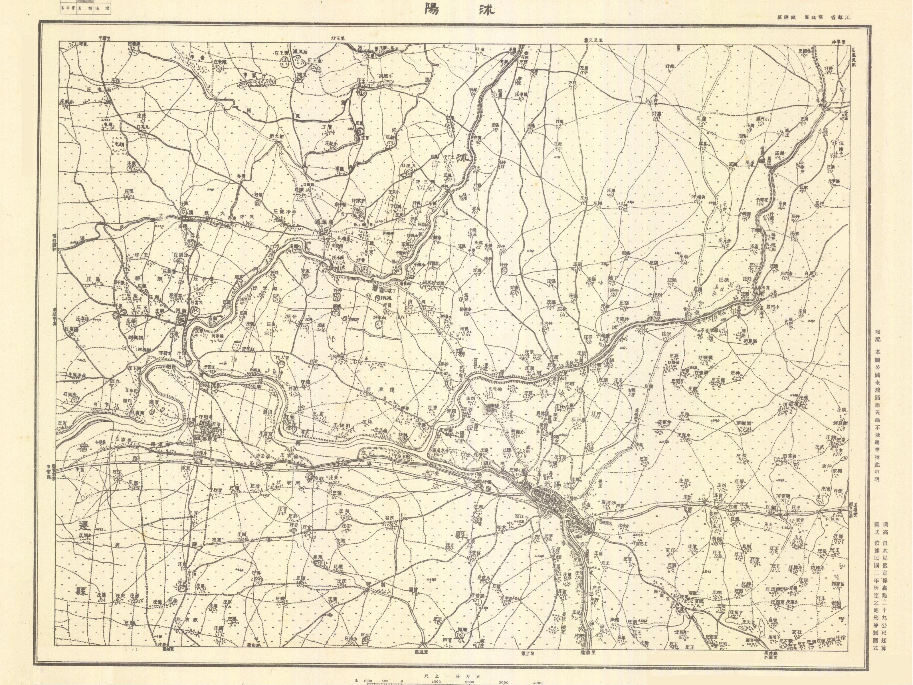 中文（中国大陆）: 民国十二年测绘之军用地图